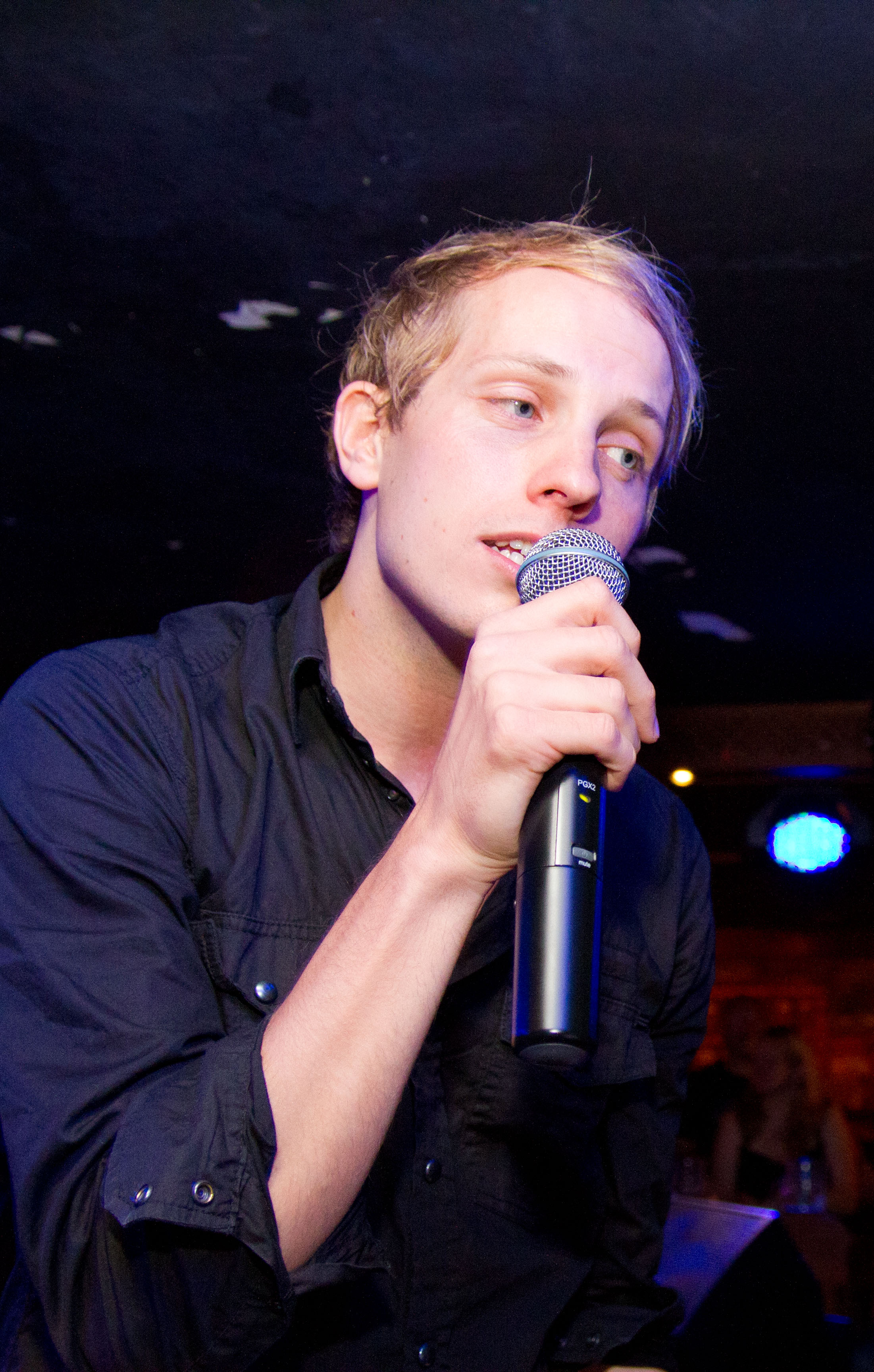 Axel Fischer bei einem Auftritt im Oberbayern auf Mallorca am 11.10.2011